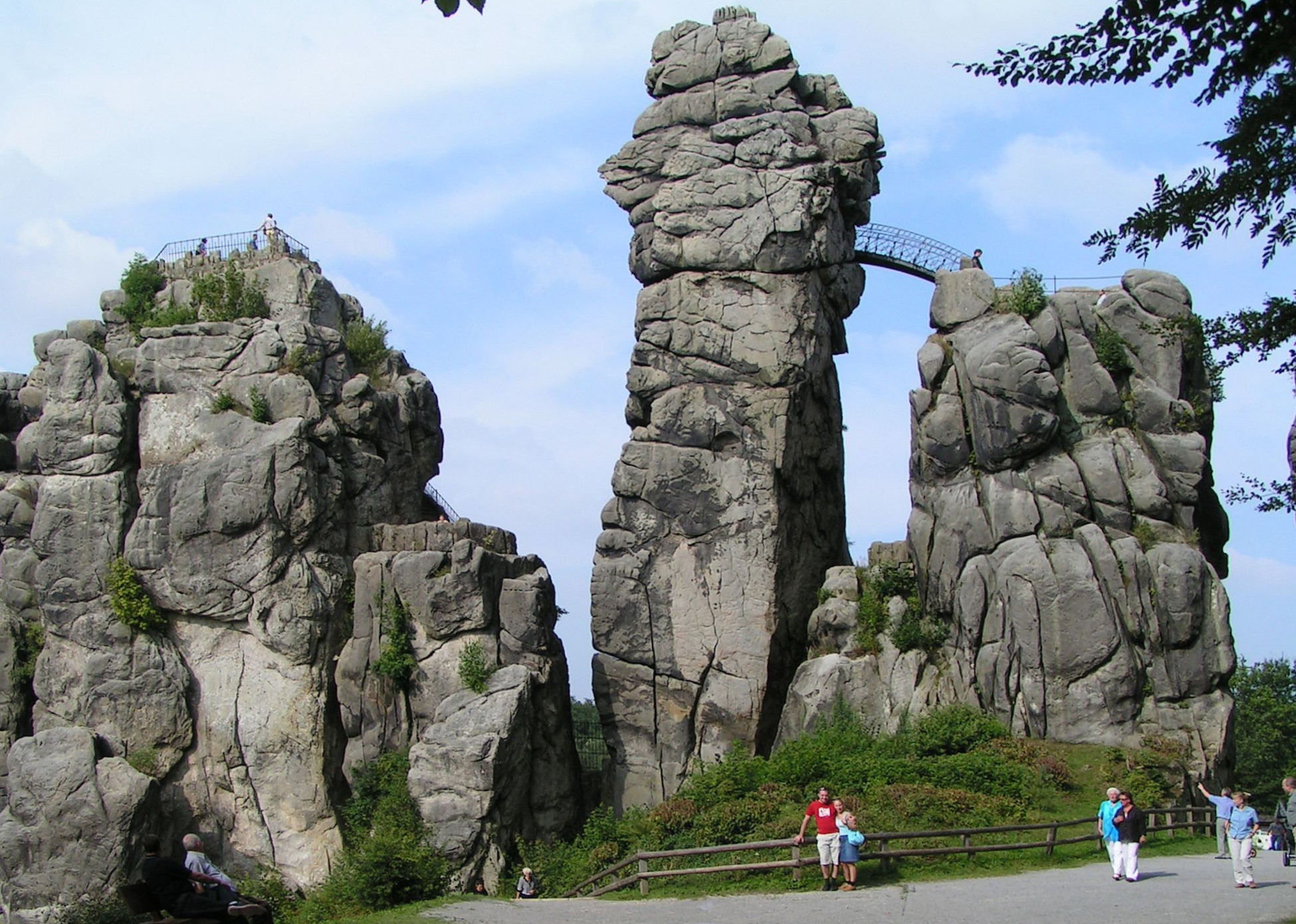 Externsteine, Ansicht Südwest - Ein Teil der Externsteine aus südwestlicher Perspektive